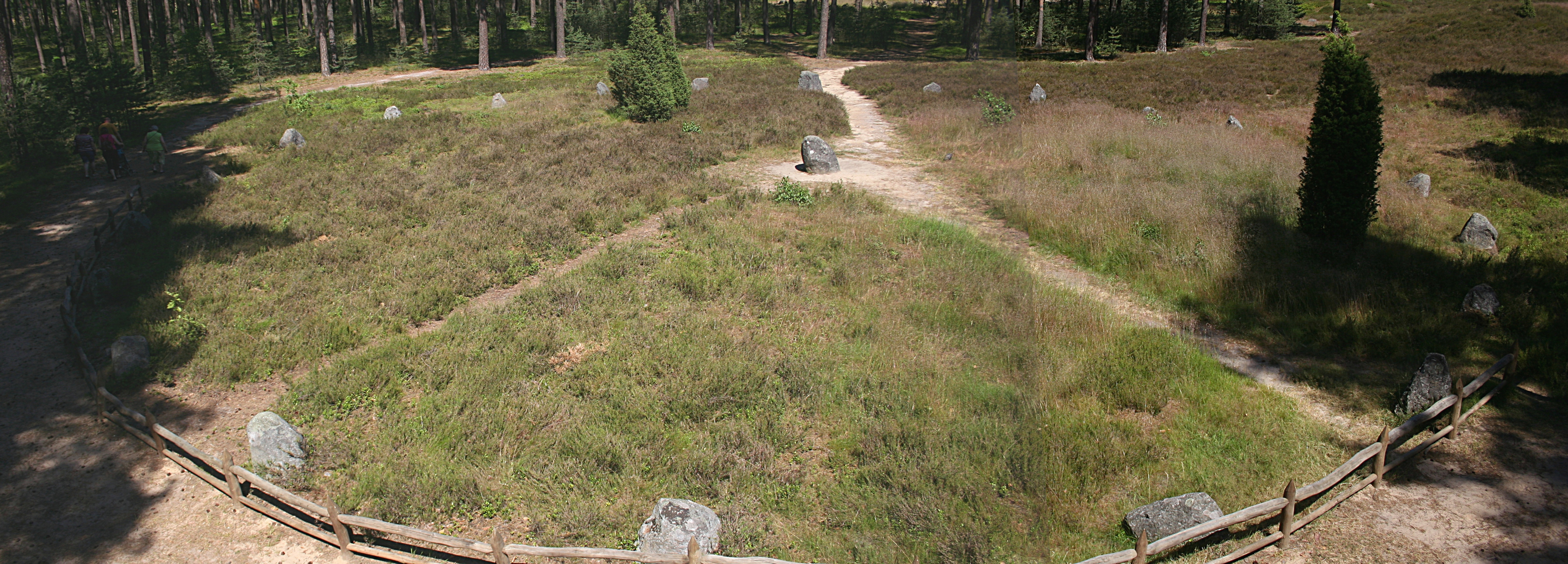 Krąŋ IV na cmentarzysku Gotów w Odrach, gmina Czersk